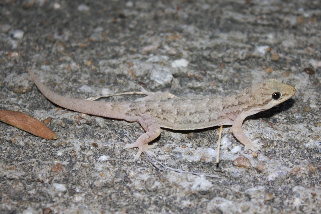 Bowring's Gecko, (Hemidactylus bowringii) Taken at Ngong Ping, Lantau.